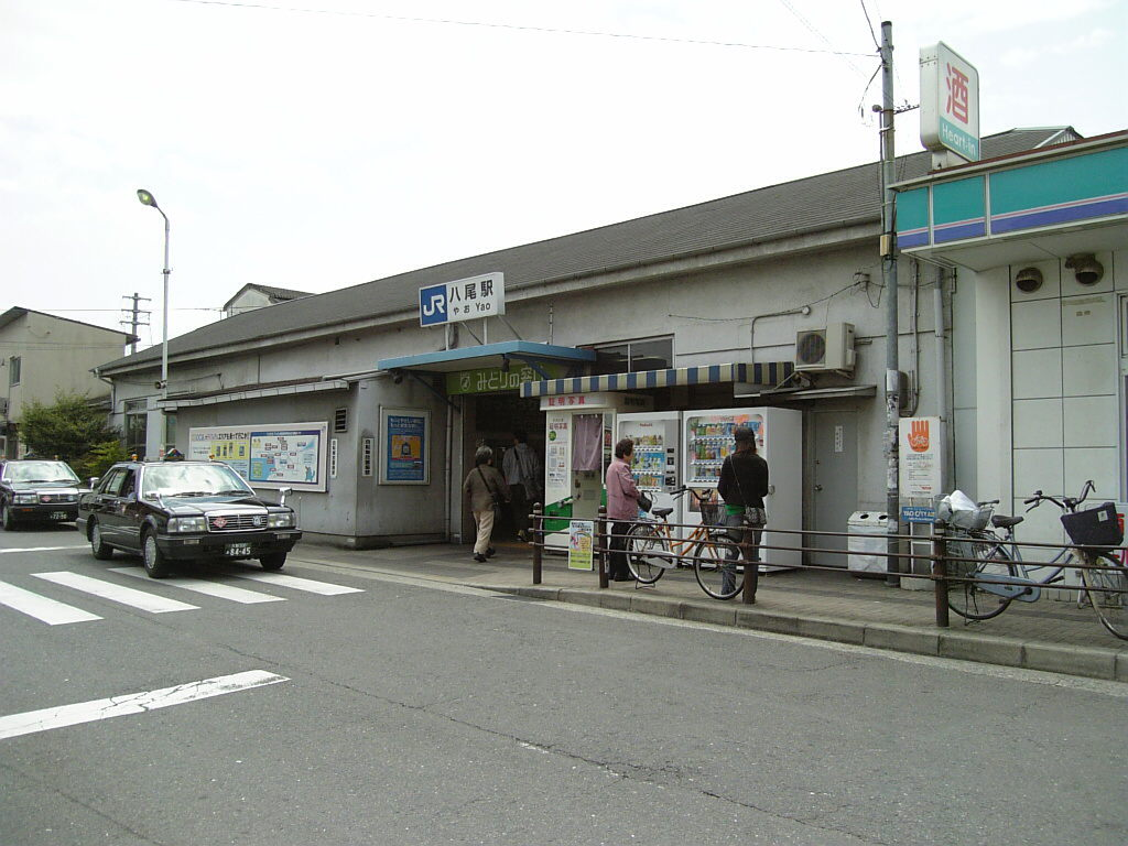 JR八尾駅北側駅舎 2007年5月2日撮影。 機材：V604SH 撮影者：Kansai explorer